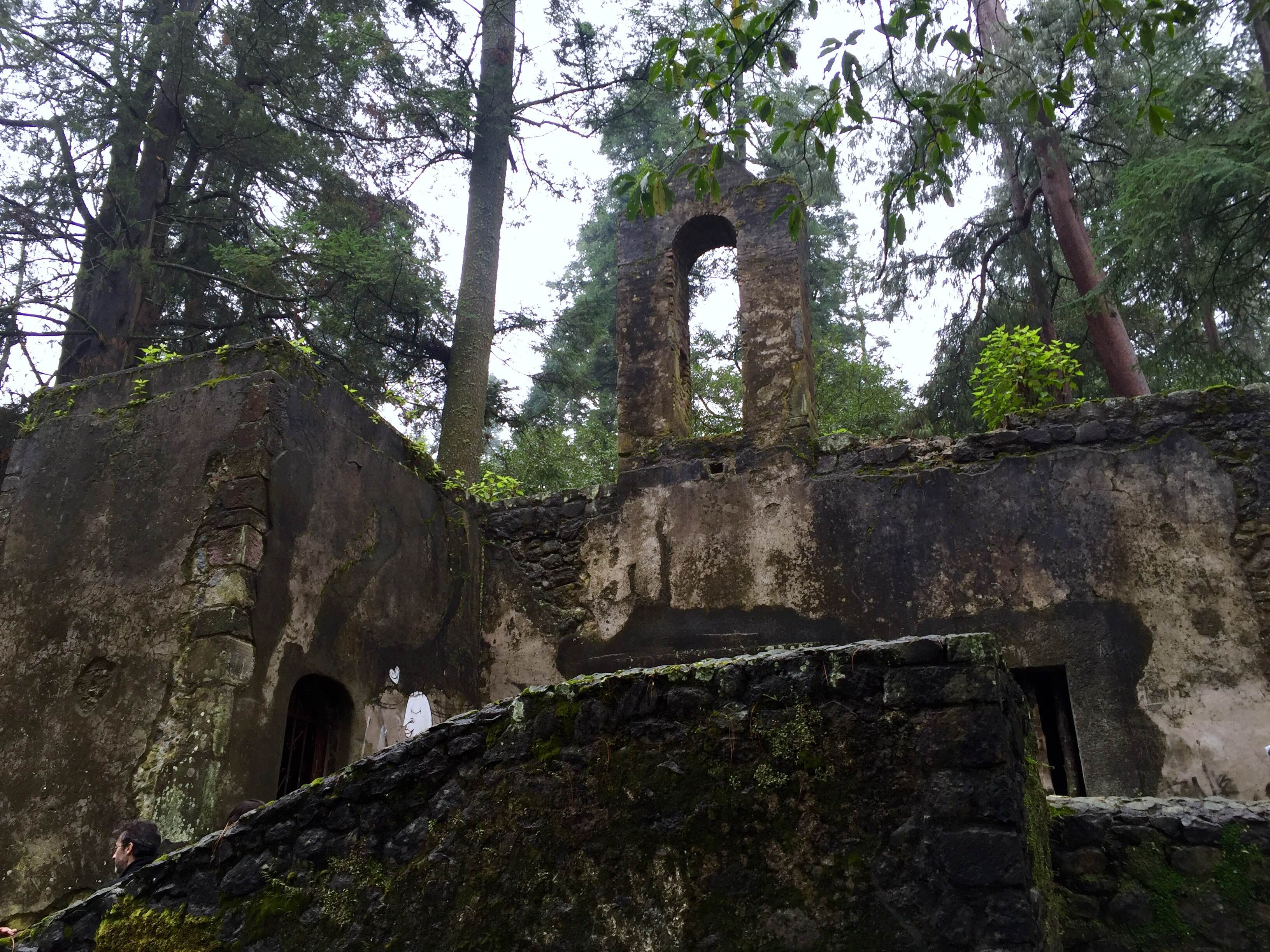 Vista frontal de la ermita de la Trinidad. En primer plano se puede ver el barandal de las escaleras que llevan a la entrada de la ermita; y en segundo plano, se puede apreciar su fachada principal, visiblemente deteriorada.